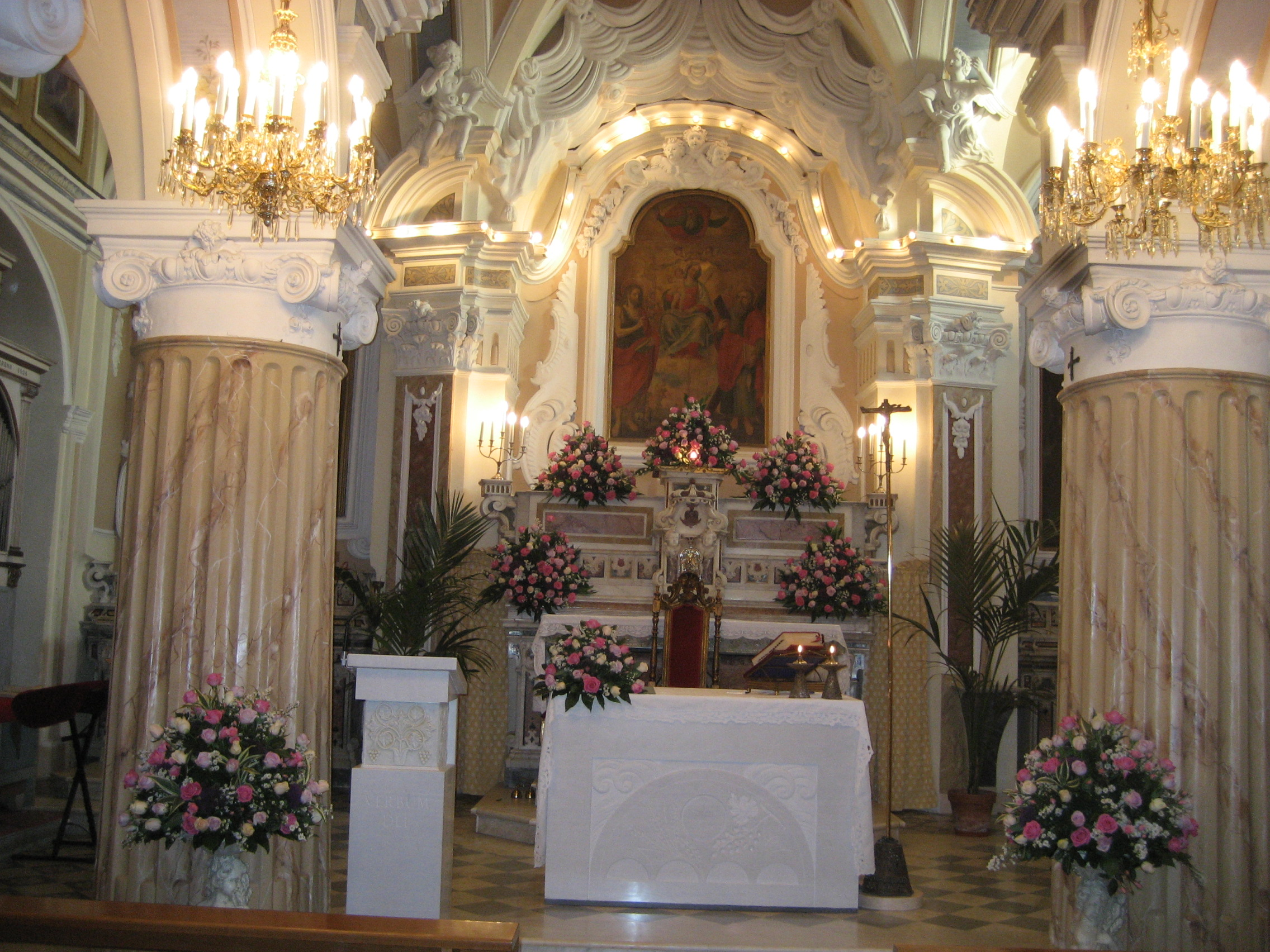 Chiesa di Sant'Antonio di Padova (Conca dei Marini): Il presbiterio con l'altare e l'ambone posti dopo il restauro di consolidamento del presbiterio nel 2000; il quadro dell'altare principale rappresenta la vergine tra San Giovanni Battista e Sant'Andrea Apostolo, patrono della diocesi.